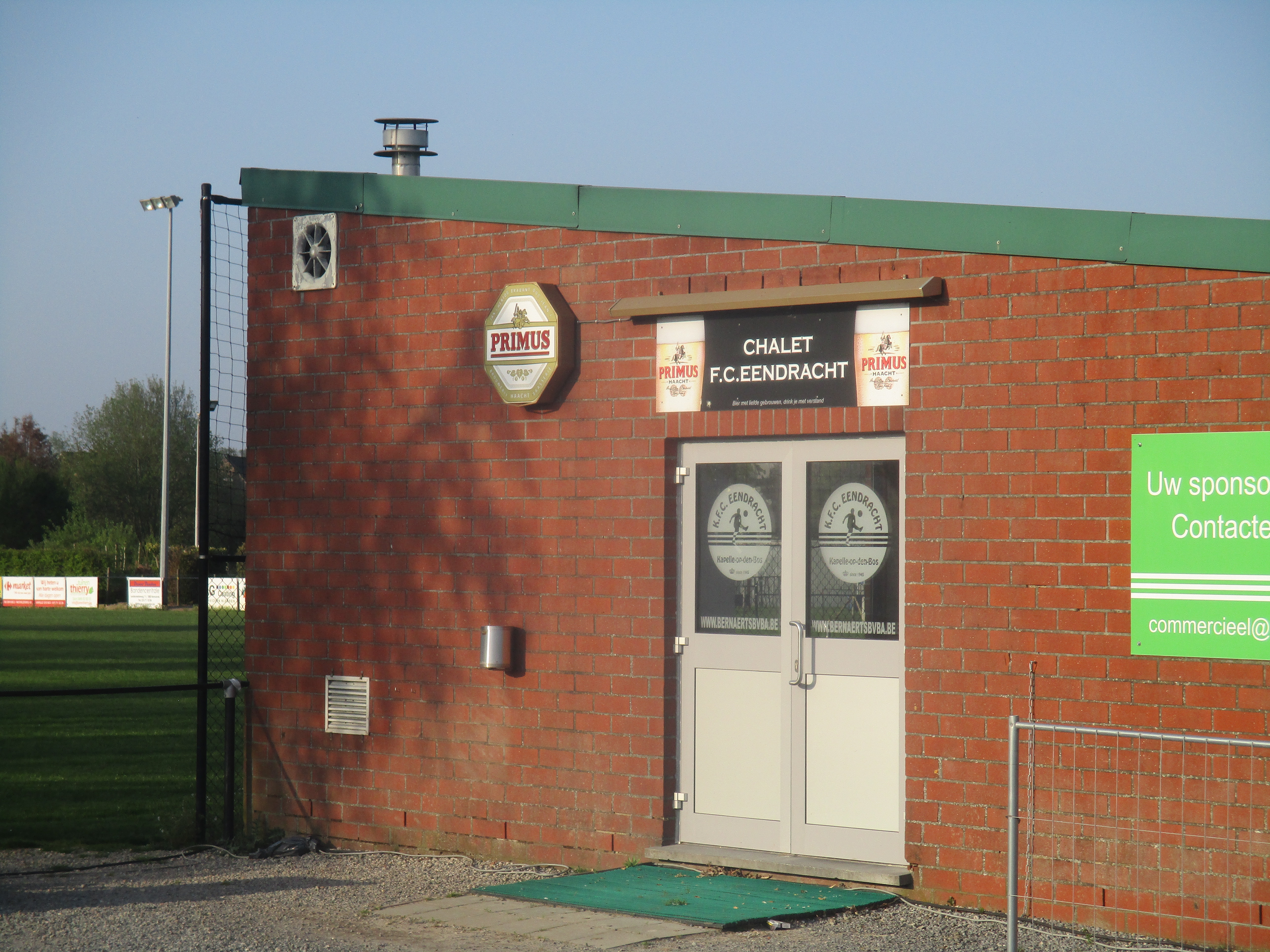 Het Karel Symonsstadion.